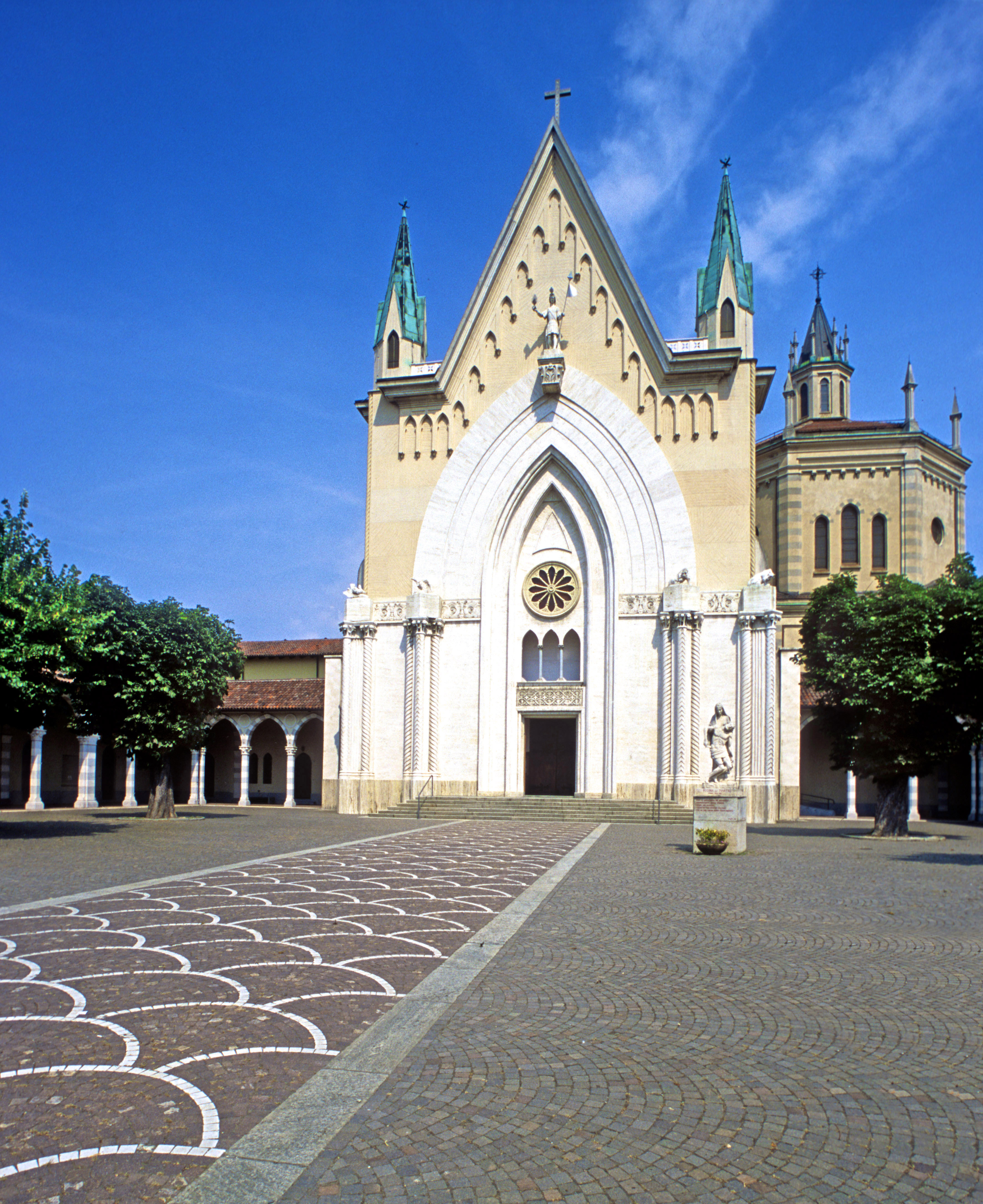 Santuario di San Pancrazio - Pianezza (To)